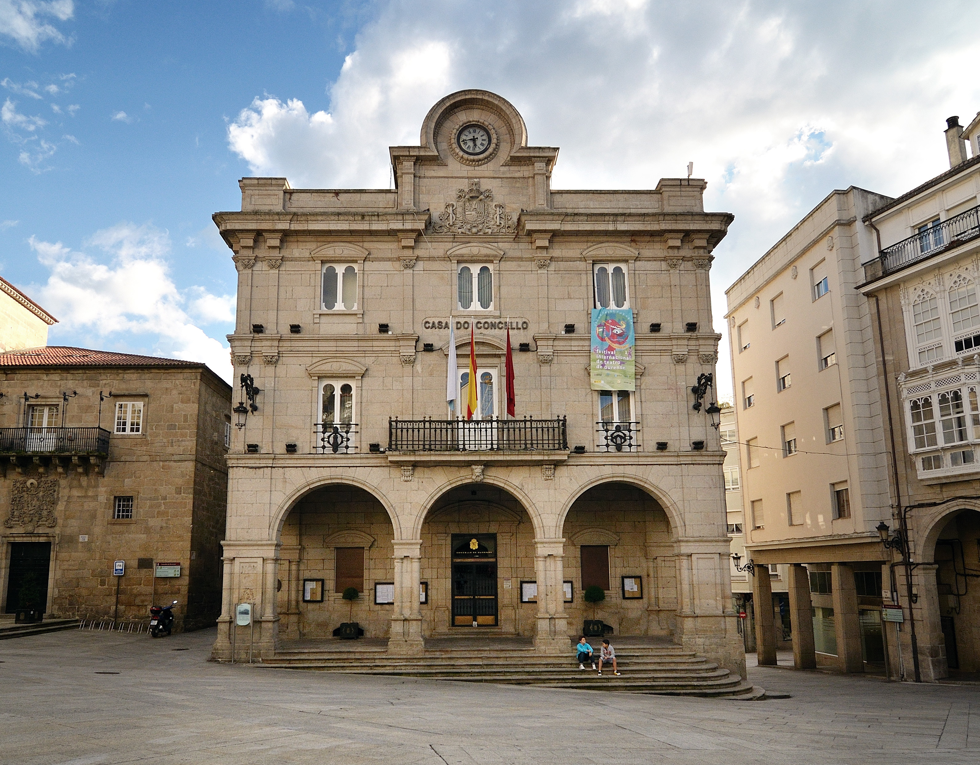 Ayuntamiento de Ourense